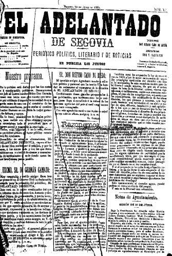 Reproducción de la portada del primer número de El Adelantado de Segovia, el 21 de junio de 1901